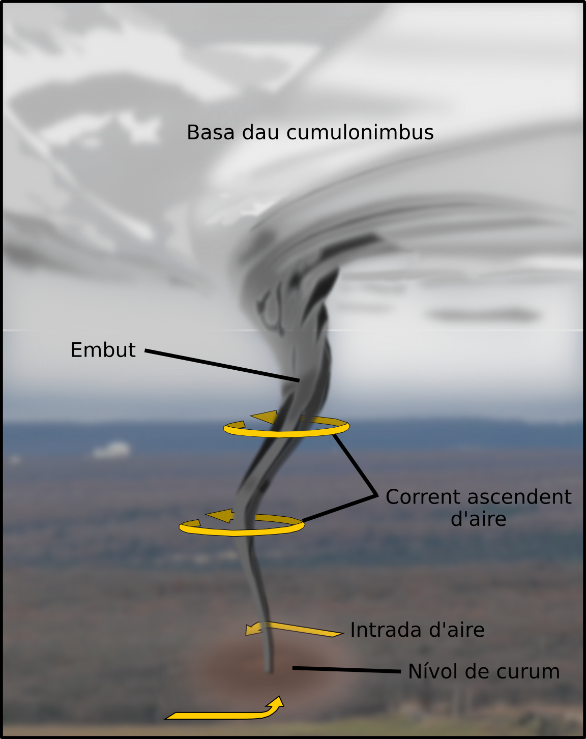 Esquèma generau dau revolum d'un tornado.